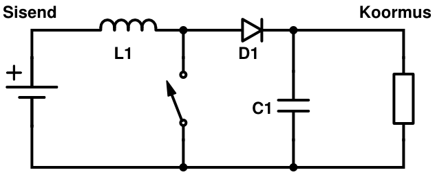 Boost muunduri skeem